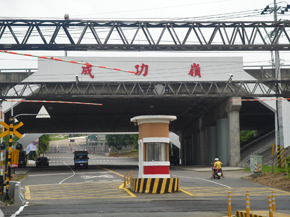 台中市烏日區成功東路上與鐵路平交道後的成功嶺一號門。